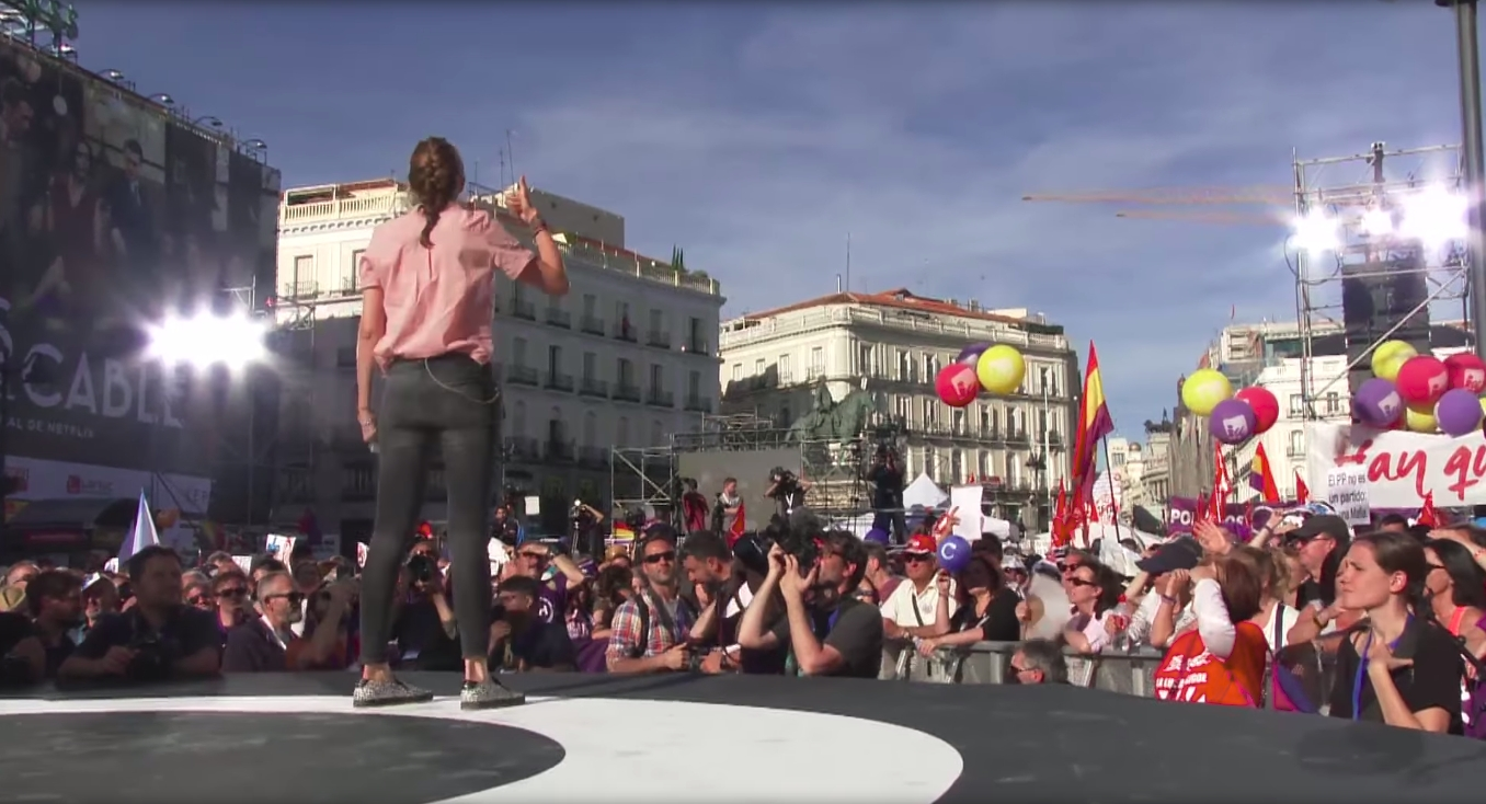 En la concentración en favor de la moción de censura el 20 de Mayo en la Puerta del Sol.